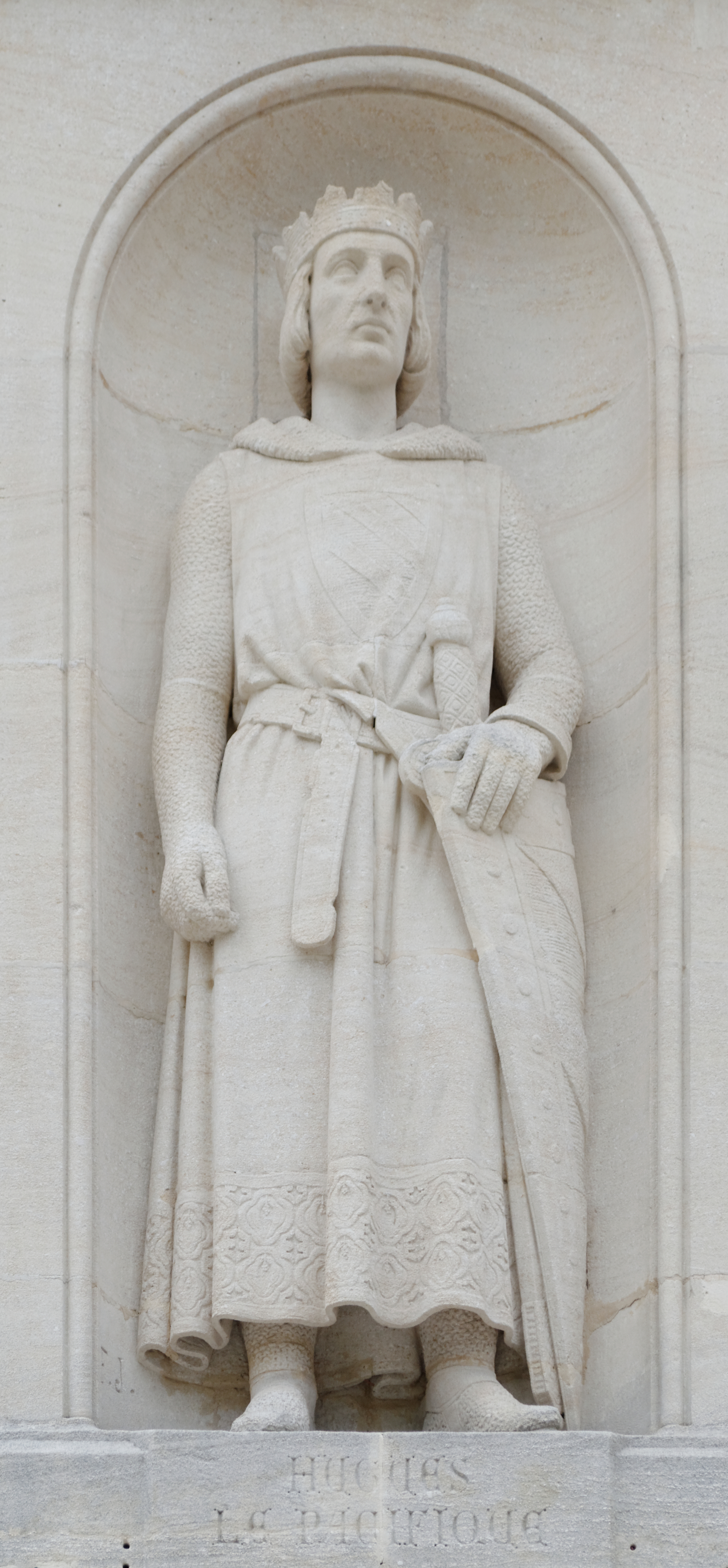 Hugues II de Bourgogne dit le pacifique né vers 1085, mort peu après le 6 février 1143, duc de Bourgogne de 1103 à 1143, fils du duc Eudes Ier Borrel et de Sibylle de Bourgogne(aussi appelée Mahaut) (vers 1065 - † ap. 1103), fille de Guillaume, comte palatin de Bourgogne.